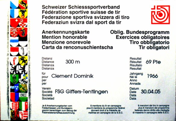 Anerkennungskarte des Schweizer Schiesssportverbands (siehe auch Schiesswesen ausser Dienst). Die Auszeichnung gehört dem Fotografen.